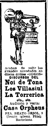 Anunci d'un disc amb els discursos d'en Josep Molera, el Noi de Tona, 1916.